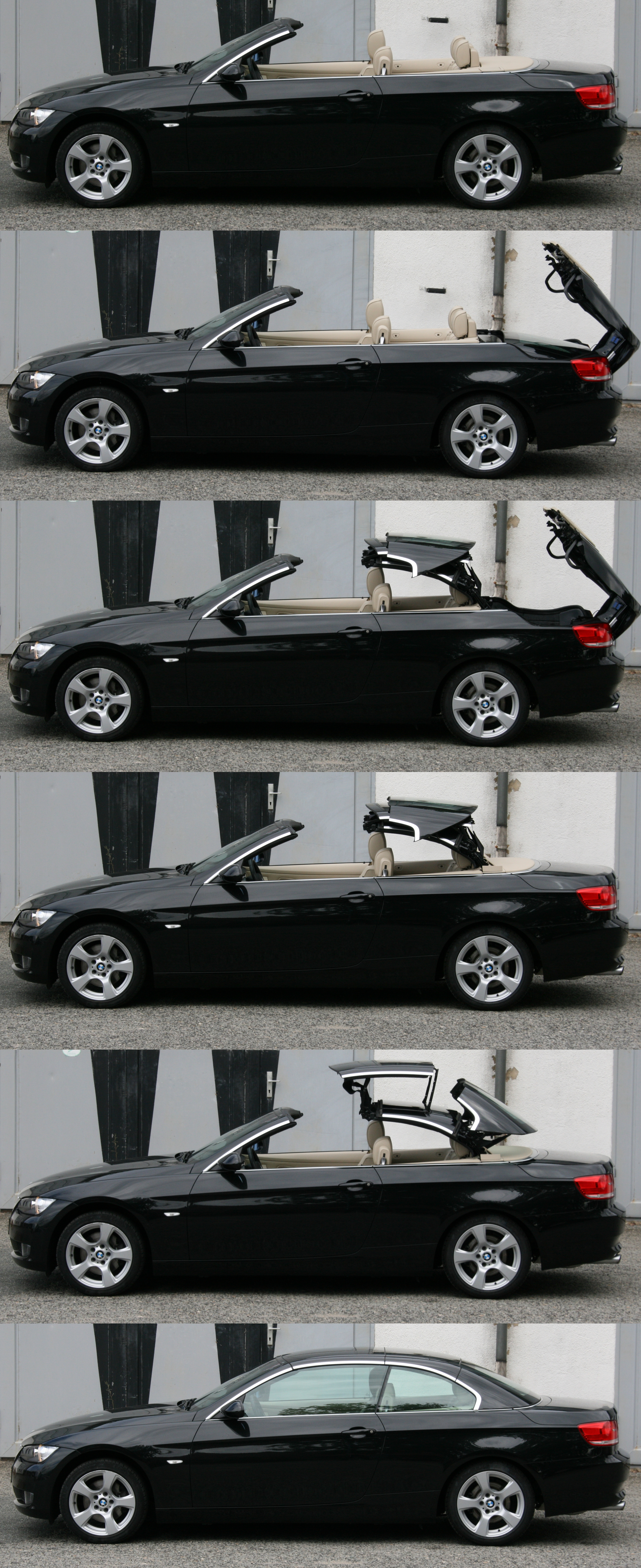 Schließvorgang des Verdecks an einem E93 BMW 320Ci Cabrio aus 2008